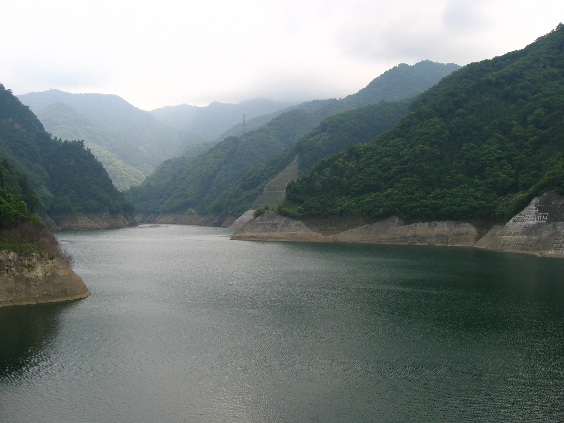 Ueno Dam (上野ダム) makes Lake Okukanna (奥神流湖).